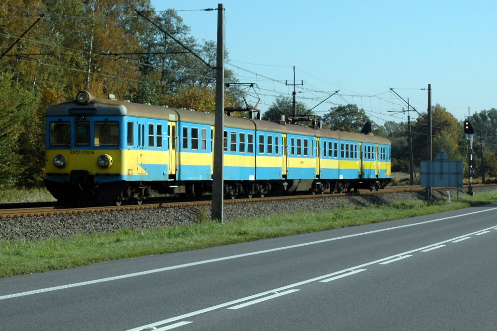 Trójwagonowy elektryczny zespół trakcyjny EN57 na linii kolejowej nr 401 koło Piask Wielkich.